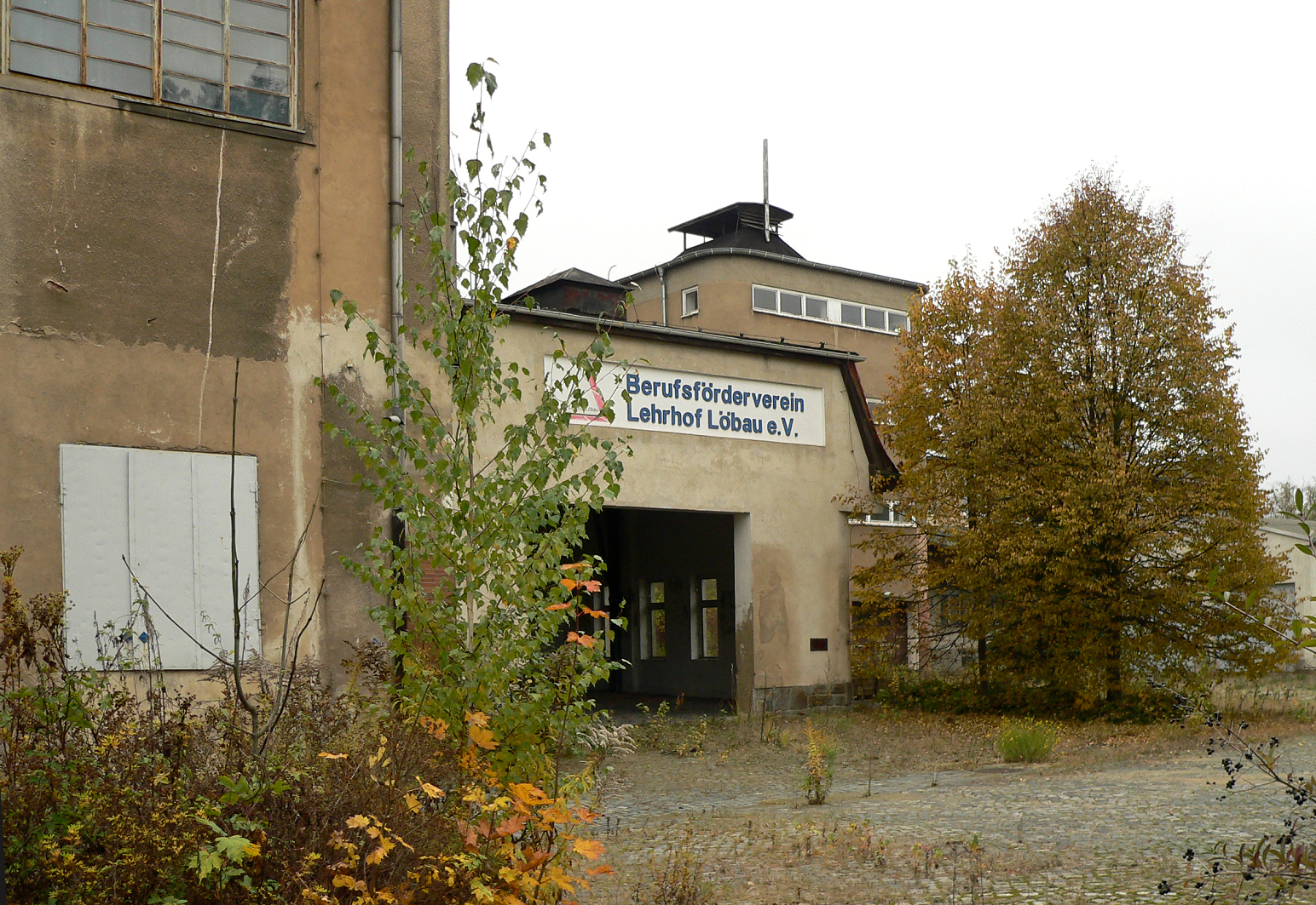 Fabrikhof von Loeser & Richter